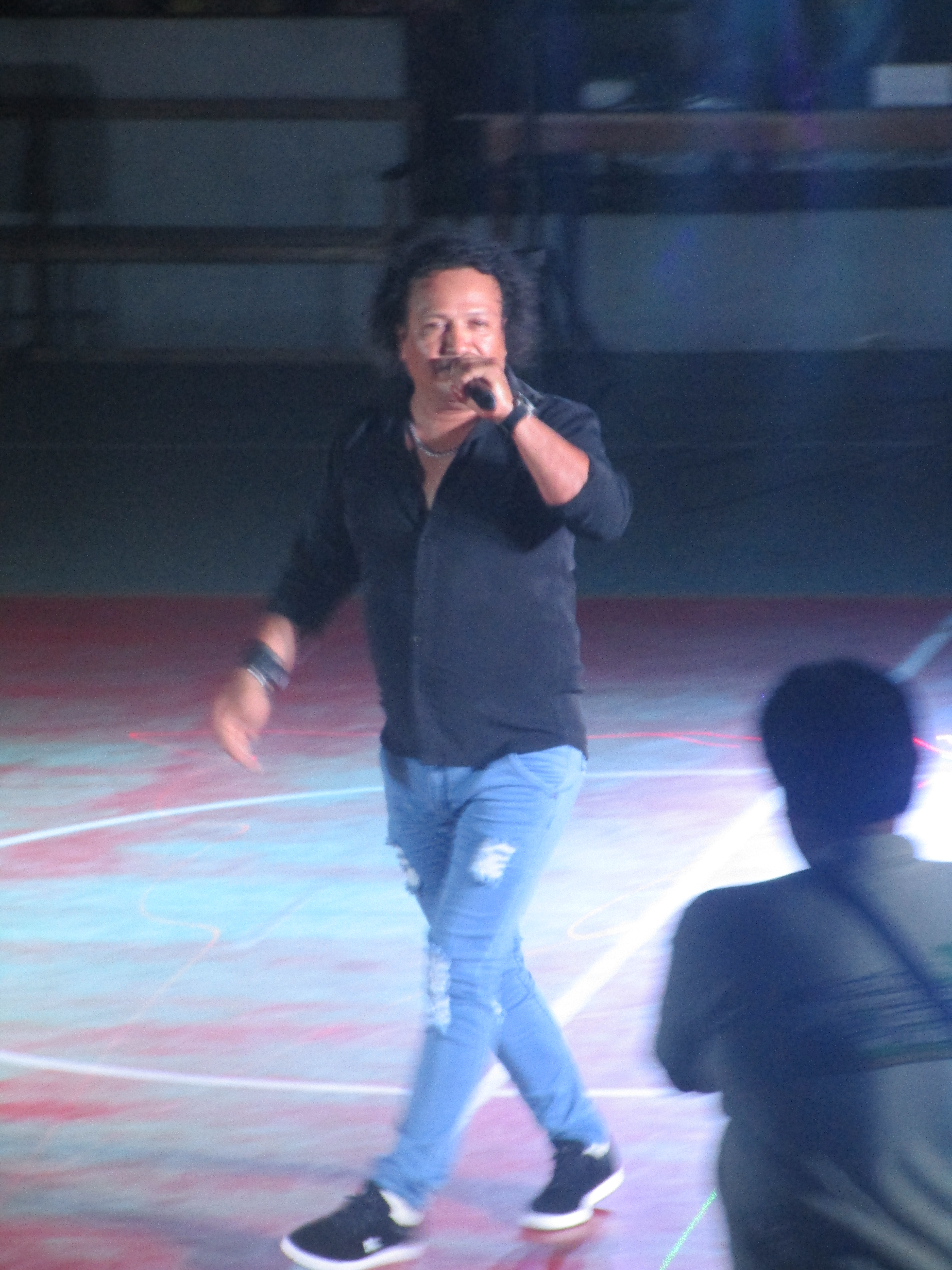 Marco Heysen en el 2016